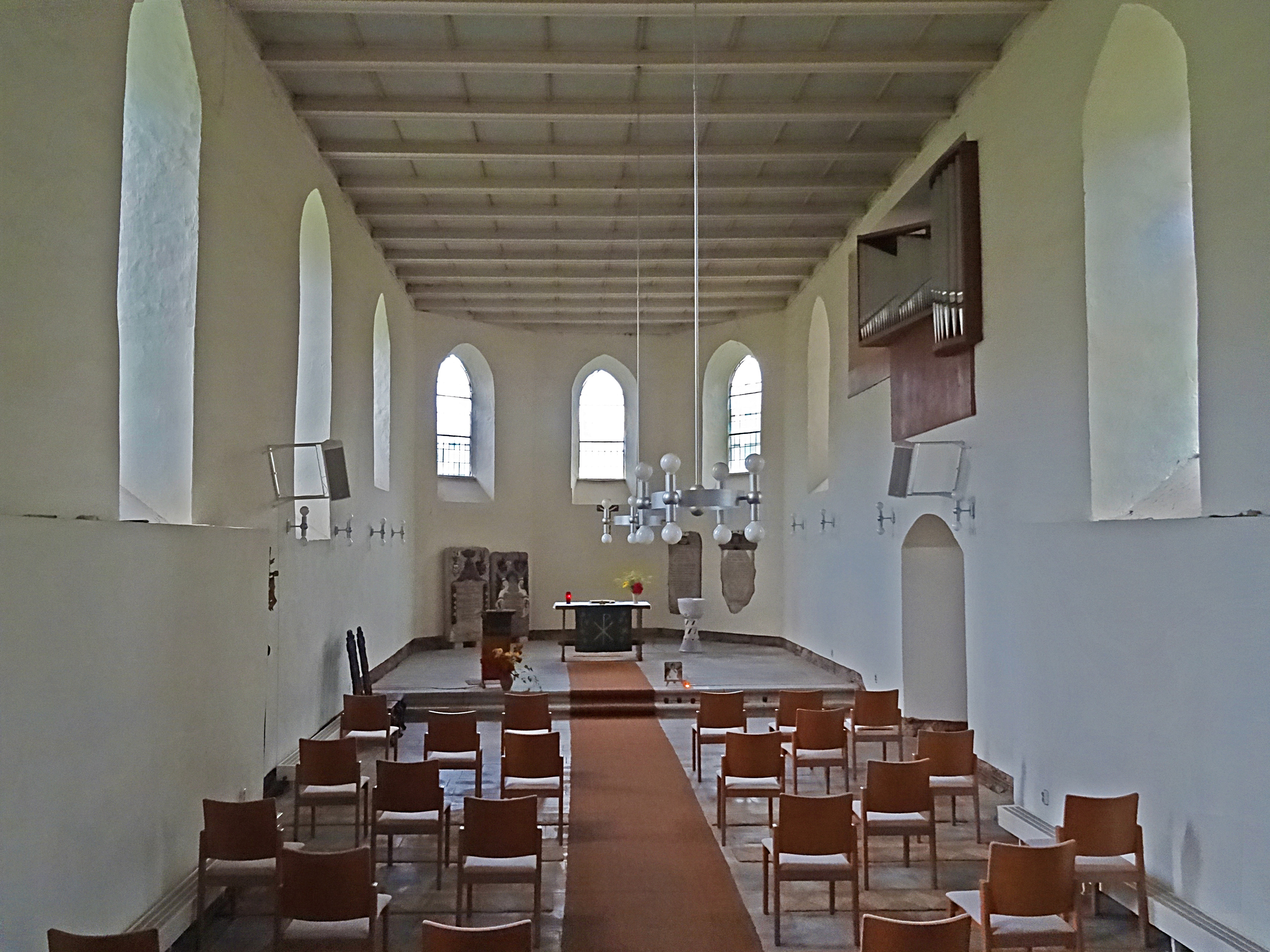 Innenansicht der Auferstehungskirche Drackendorf